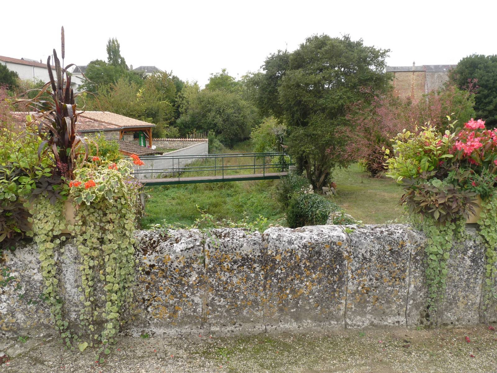 la Péruze (à sec), Ruffec, Charente, France